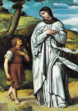 Moretto, Apparizione della Madonna al sordomuto Filippo Viotti